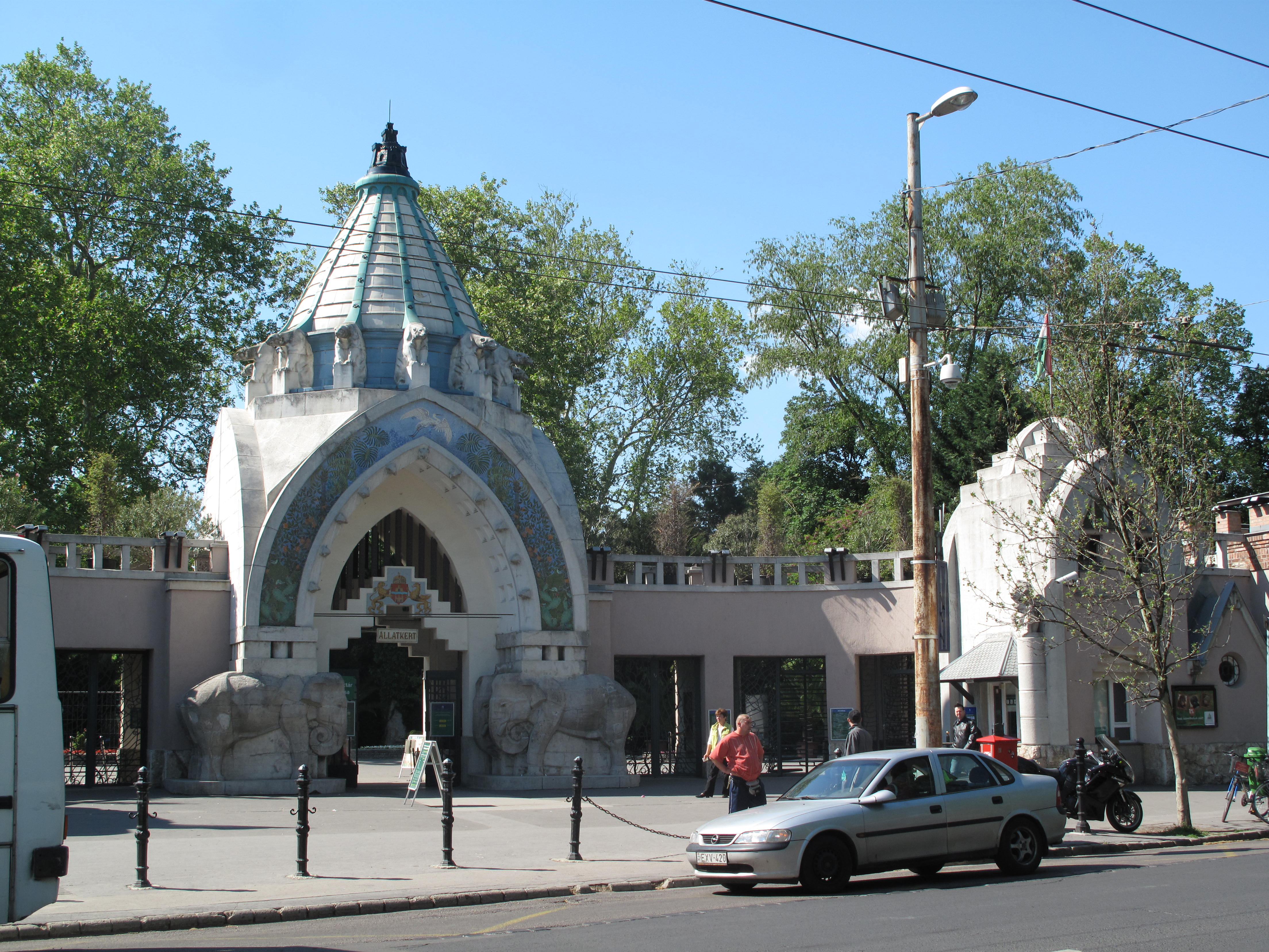 Budapešť